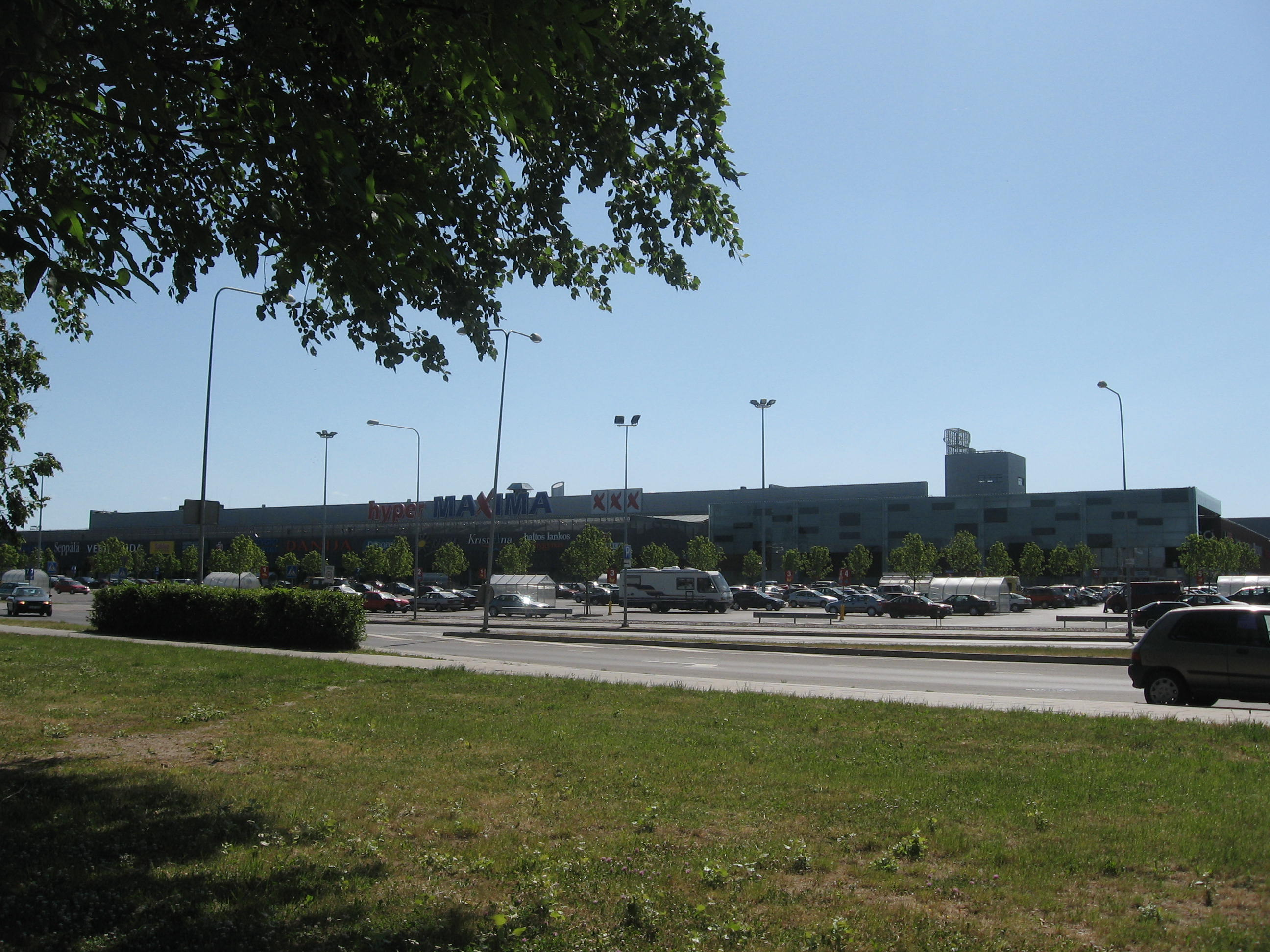 Klaipėdos Akropolis